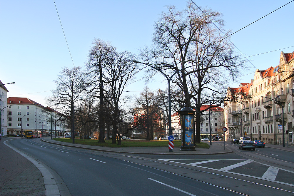 Gabelung der Nürnberger Straße in Dresden am Nürnberger Ei – einem Platz in der Südvorstadt